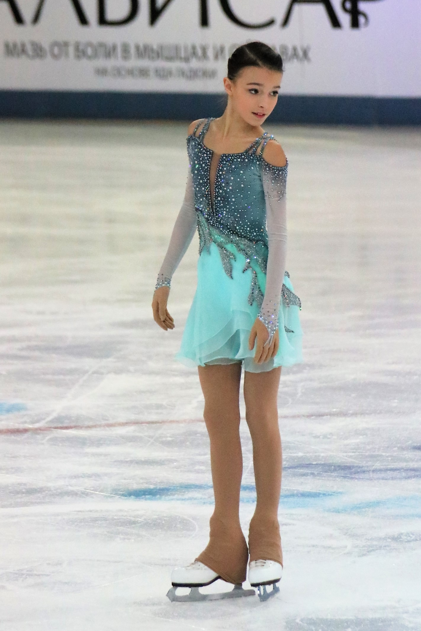 Анна Щербакова на чемпионате России по фигурному катанию на коньках 2019